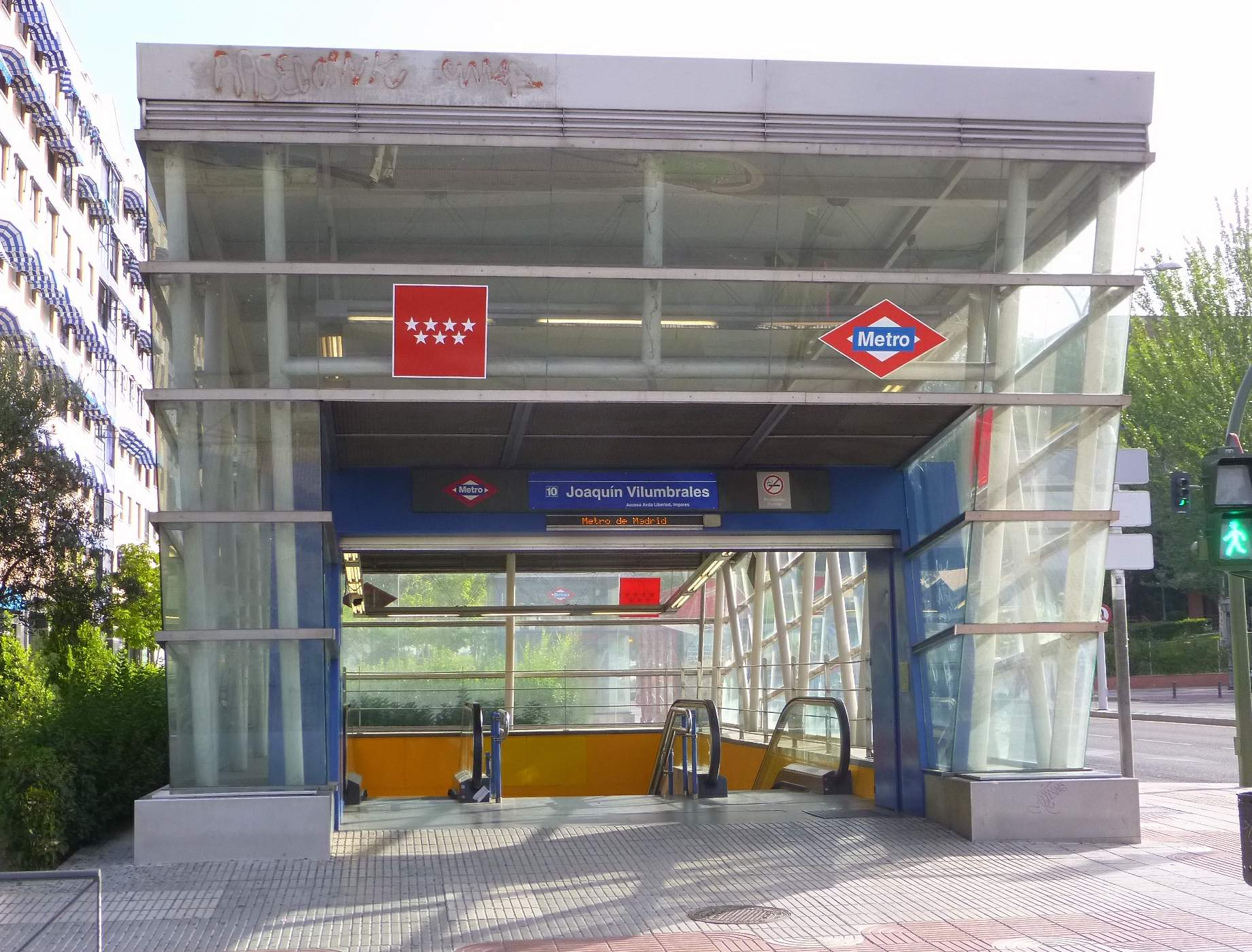 Alcorcón - Estación de Joaquín Vilumbrales